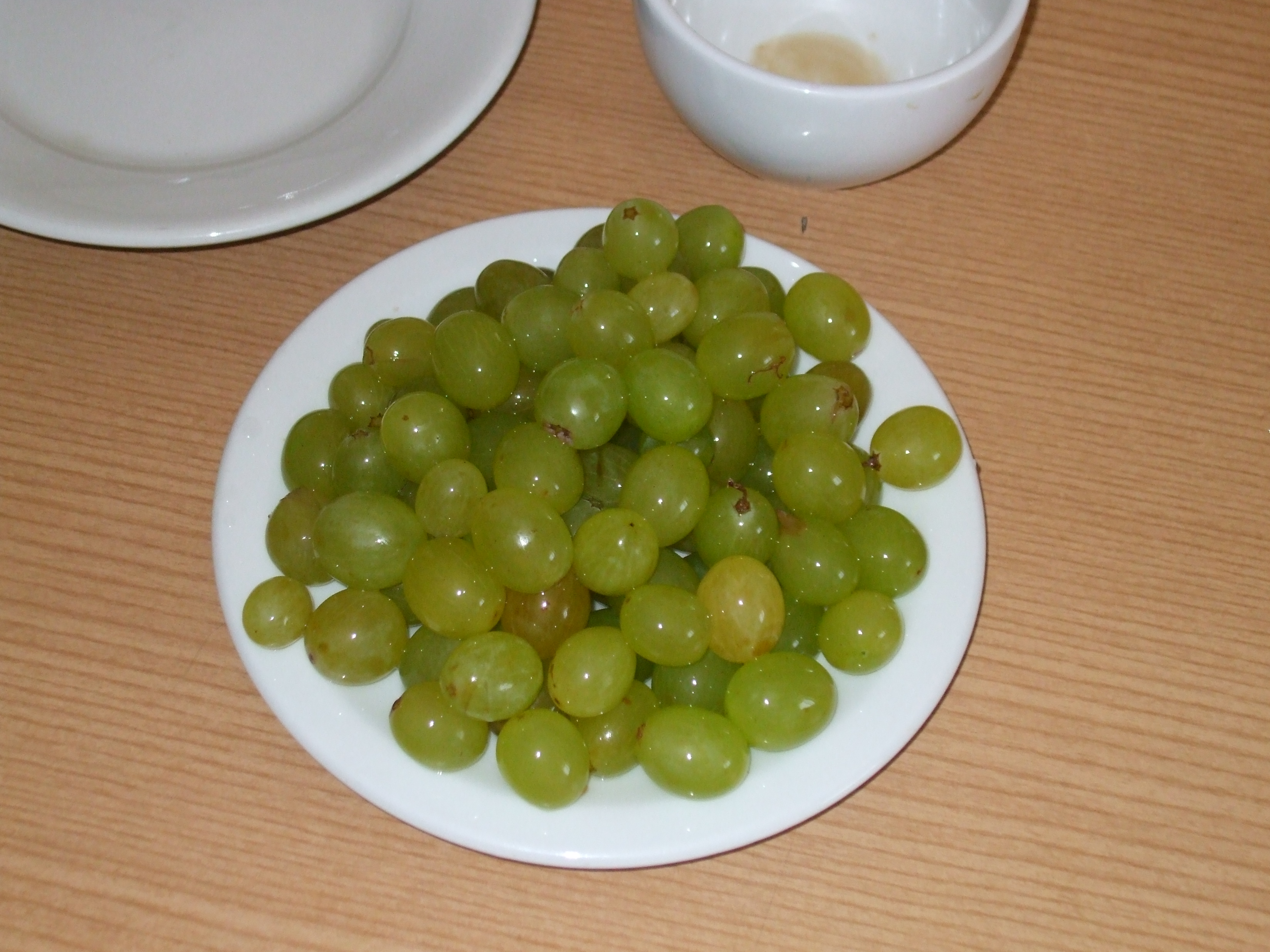 horzno na tanieri